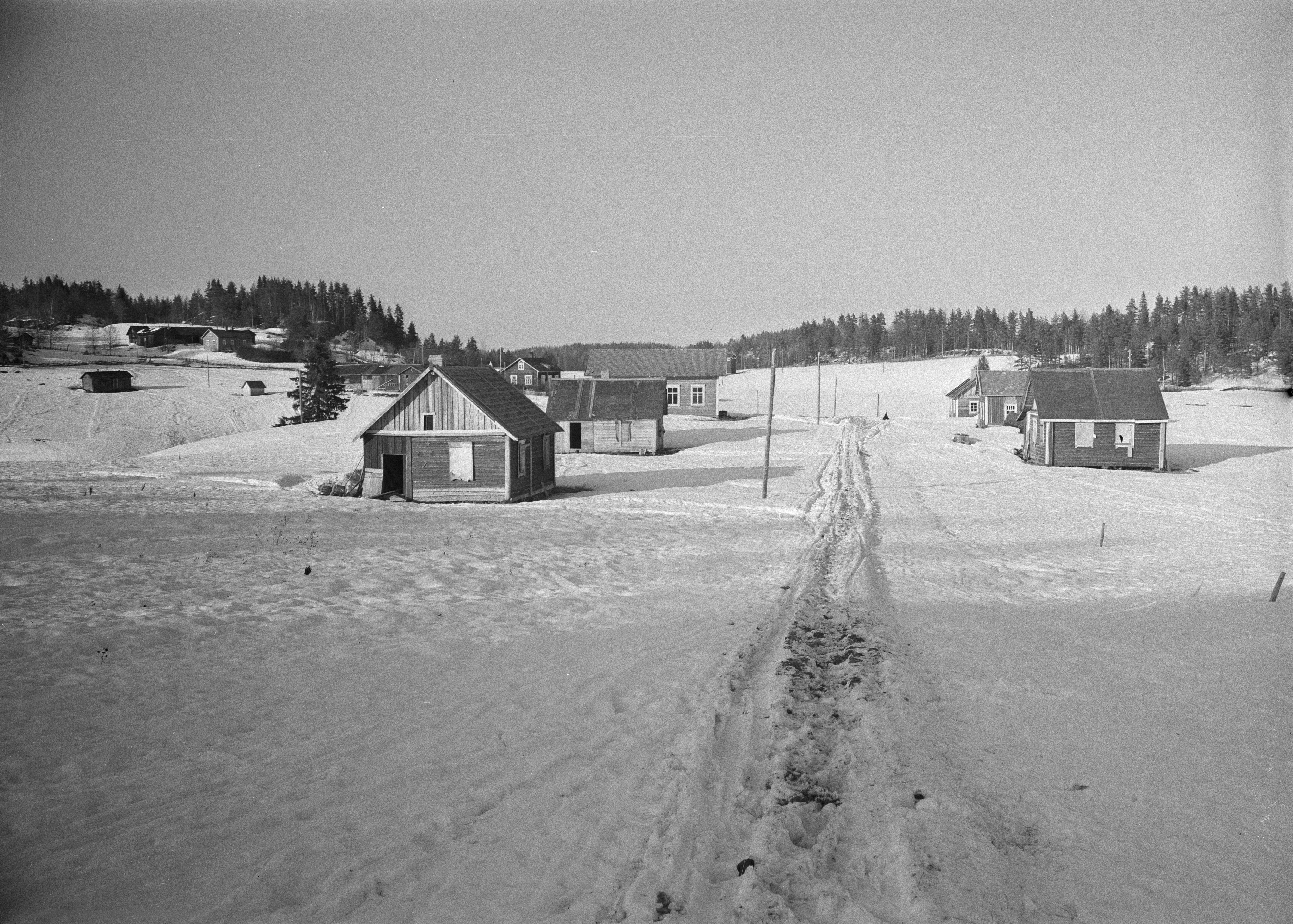 Алхо, 1941-1944 гг.